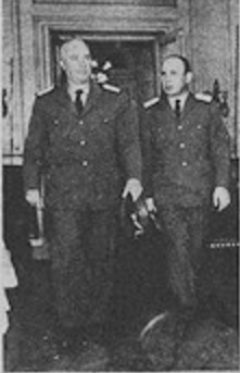 El Vicealmirante Leandro Maloberti (izquierda) junto al Contralmirante Jorge Palma (derecha).